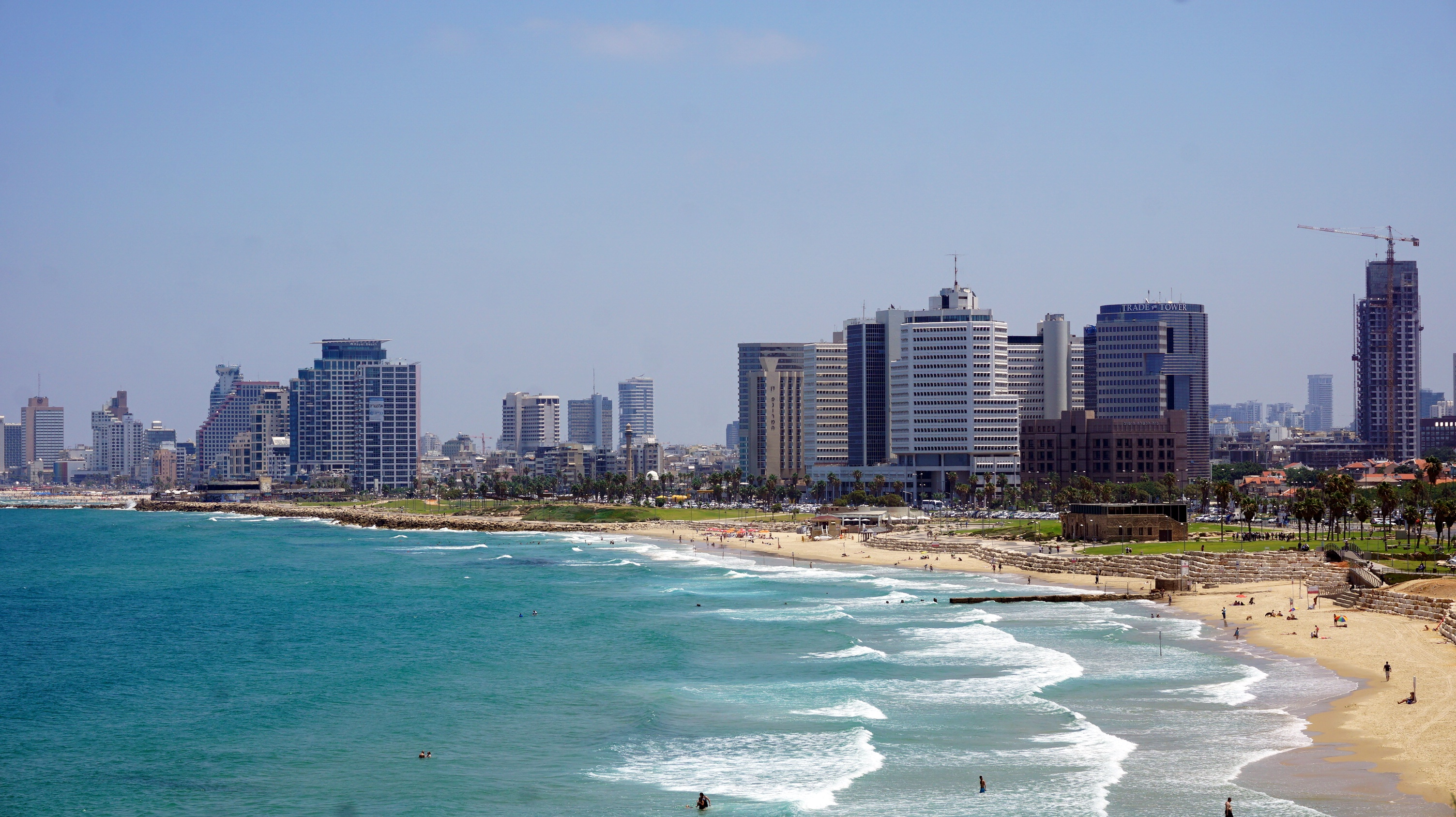 Tel Aviv Yafo 43717